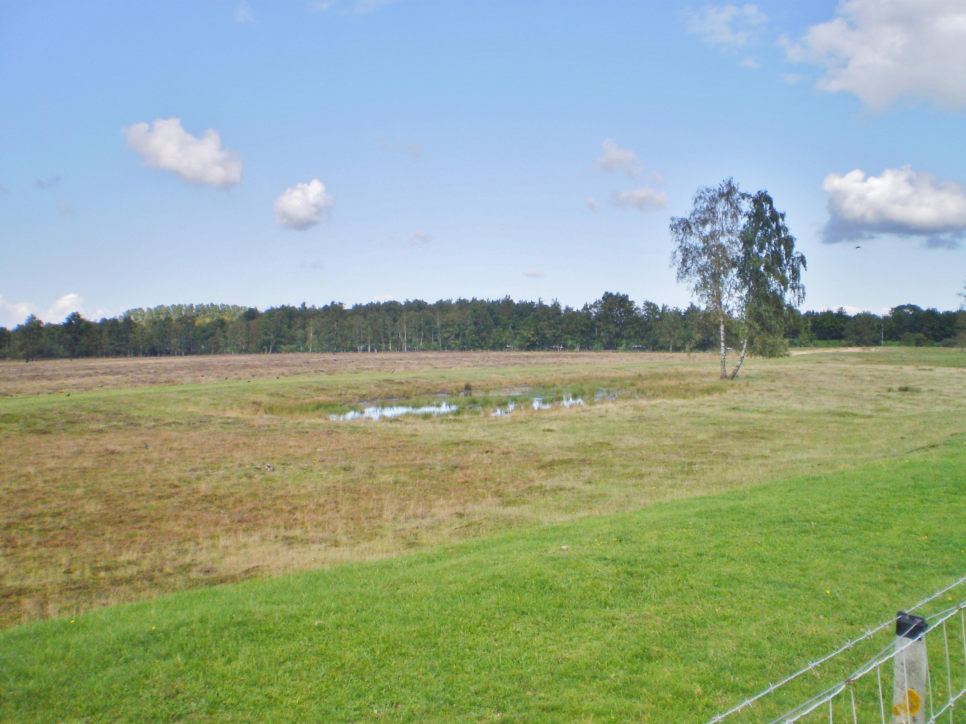 Groeve vanaf de Blaricummerweg